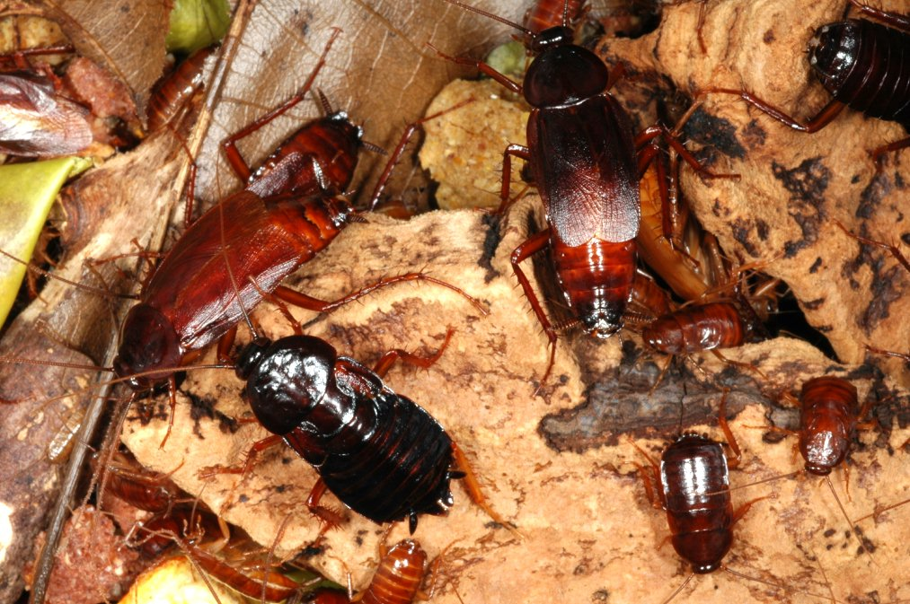 Blatta orientalis